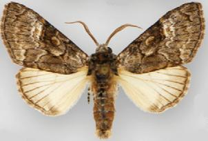 Charadra moneta male